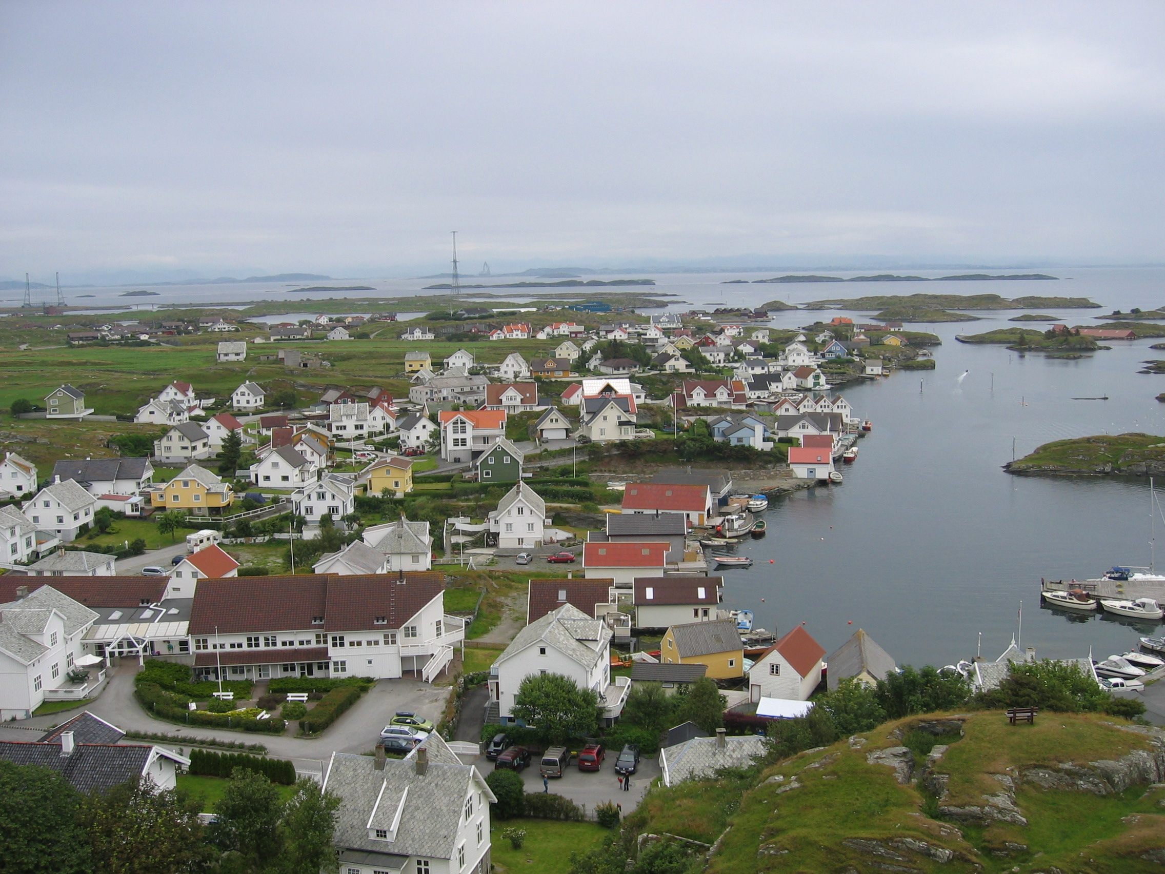 View over Kvitsoey5